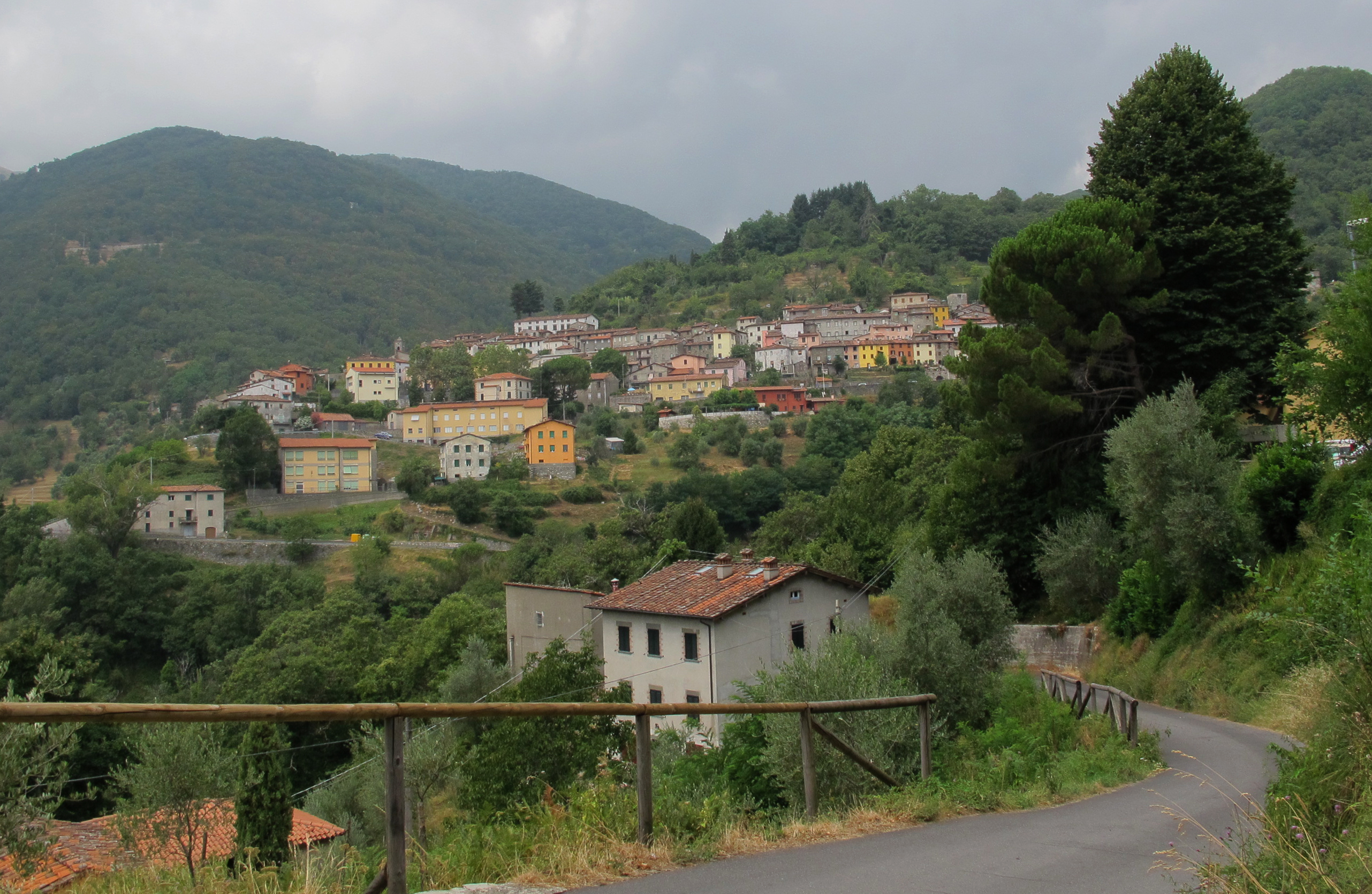 Pescaglia (il poggio) veduta